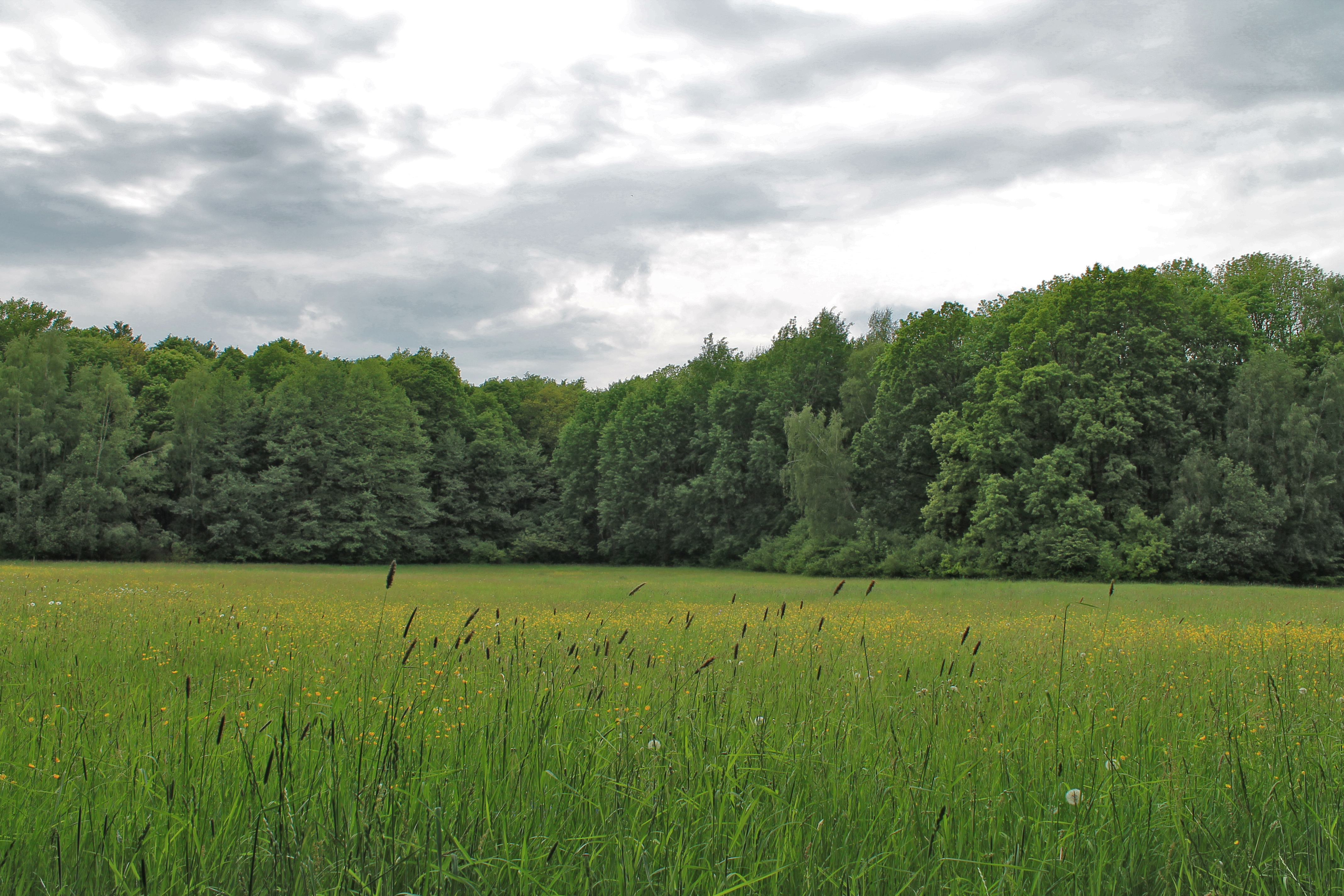 Naturschutzgebiet L15 Sachsen An der Klosterwiese Landkreis Nordsachsen